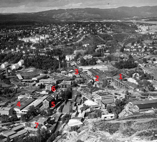 Spikerverket slik det framsto rundt hundreårsjubileet i 1953, ved inngangen til verkets storhetstid. Øverst i bildet Nordmarka med Maridalsvannet til høyre. Fra vannet renner Akerselva ned gjennom Nydalen og industriområdet midt i bildet, der Spikerverket fyller hele dalebunnen med råstoffavdelingen (1), stålverket (2) og finvalseverket (3). Lenger sør trdtrekkeriets nye haller (4) og Bakke Mølle (5). Administrasjonsbygget (6) hadde ennå ikke blitt bygget i høyden. Helt nederst i bildet Bjørheim (7). Foto: Vilhelm Skapell, Widerøes Flyselskap.